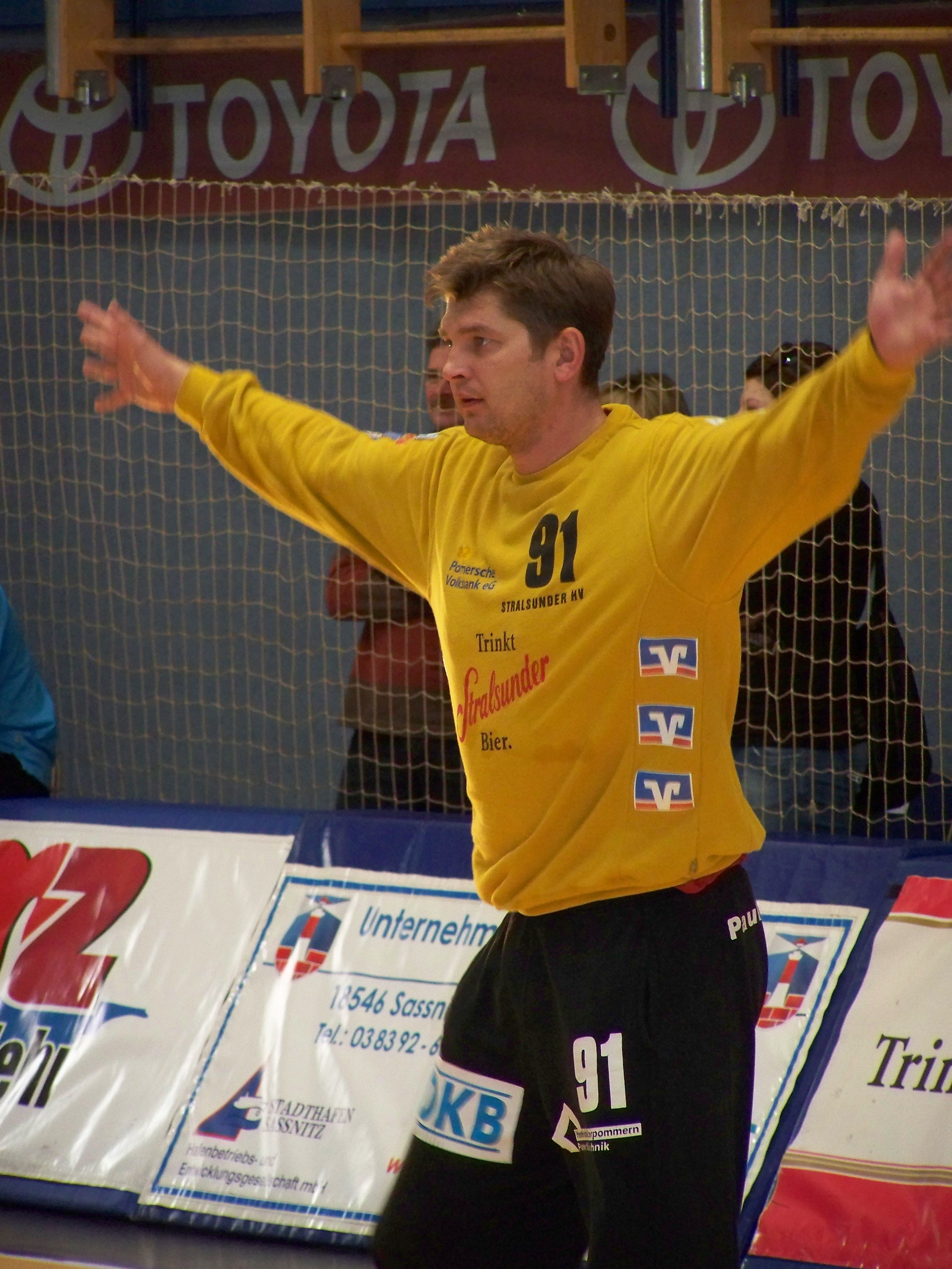 Der russische Handballtorwart Igor Wiktorowitsch Lewschin vom Stralsunder HV beim Bundesliga-Spiel gegen den MT Melsungen am 4. April 2009.